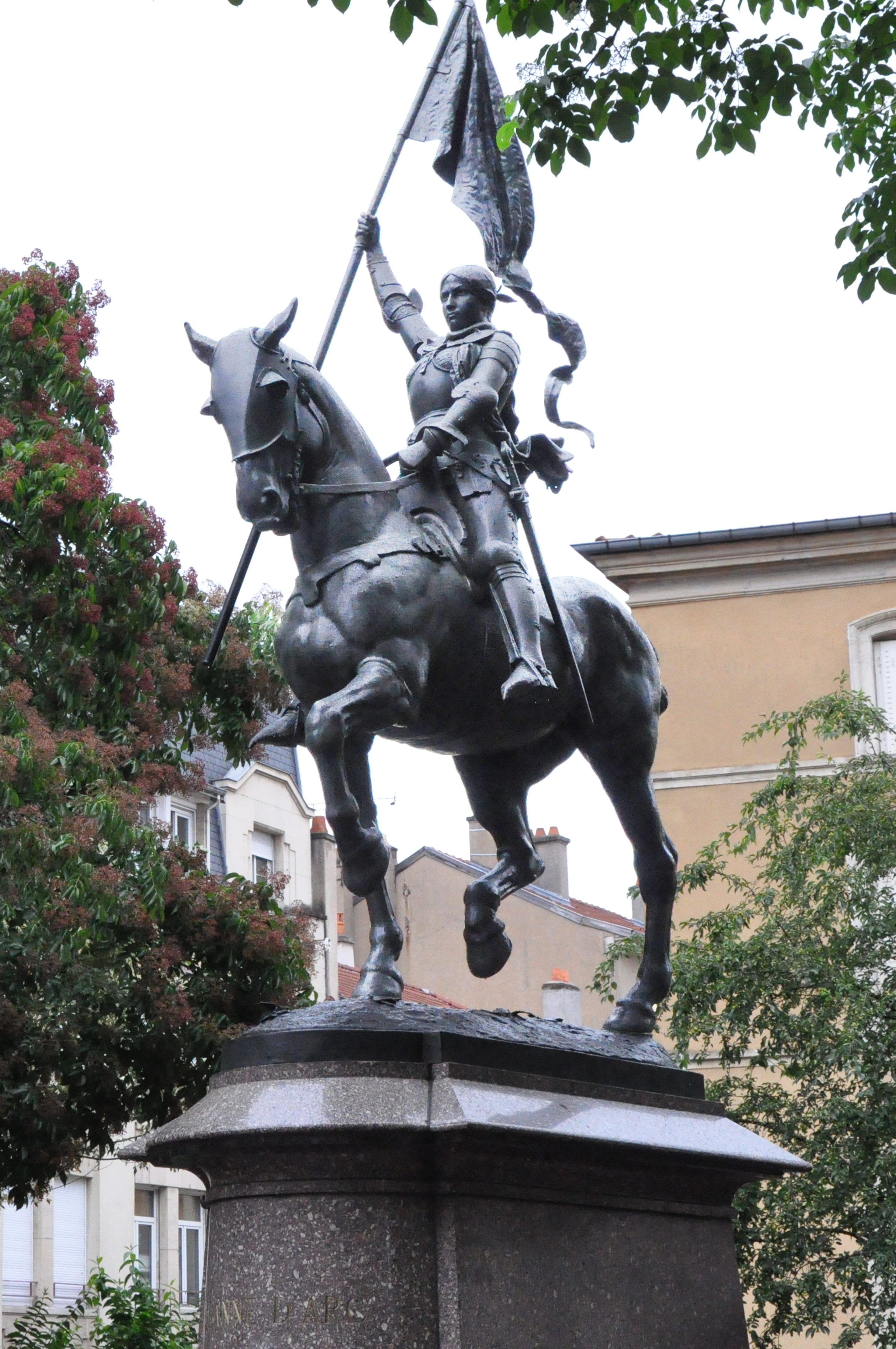 Statue équestre de Jeanne d'Arc à Nancy (Meurthe-et-Moselle)